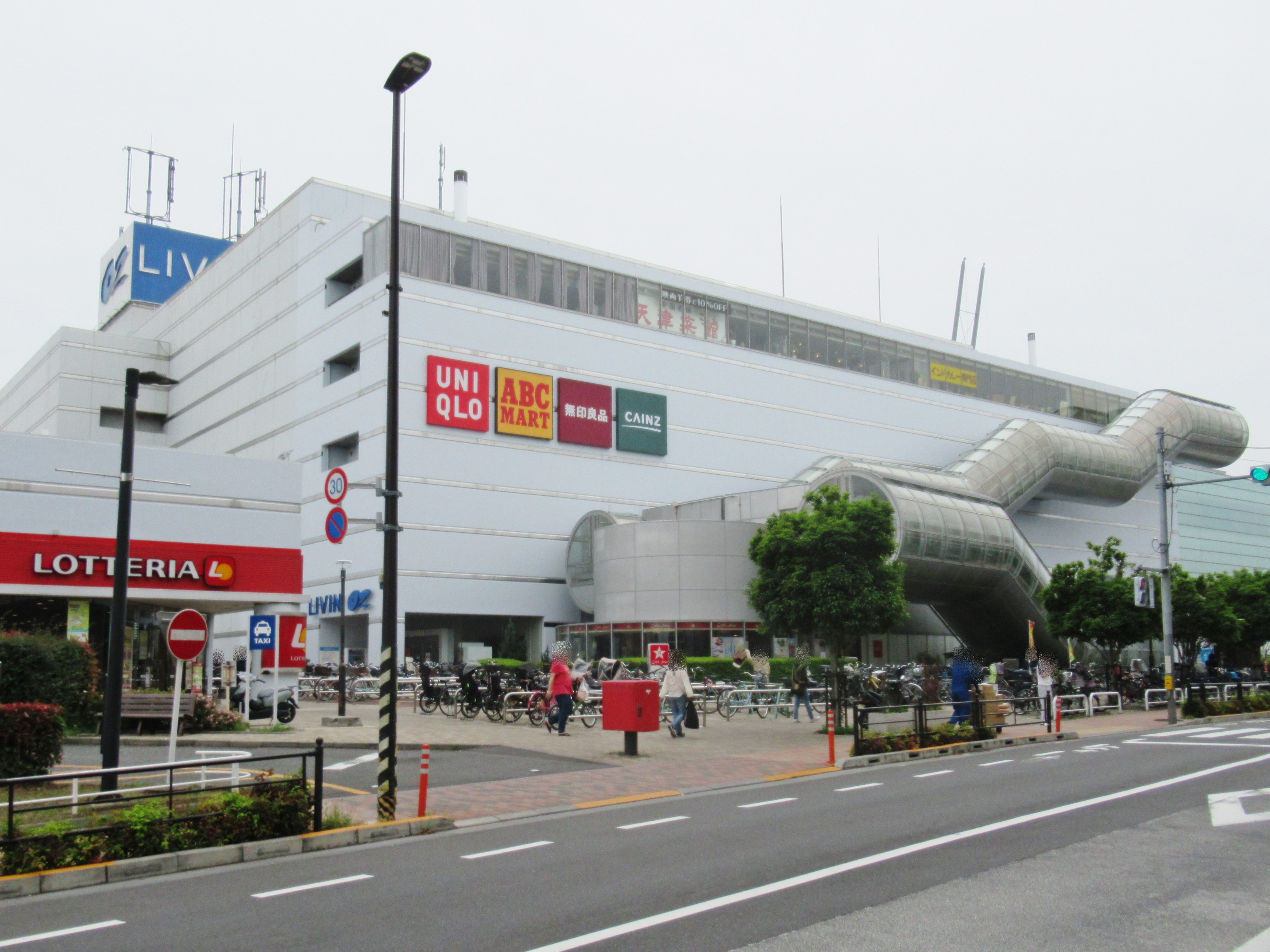 前には東映東京撮影所とOZ STUDIO CITY、隣には東映アニメーション本社が所在。東京都練馬区東大泉